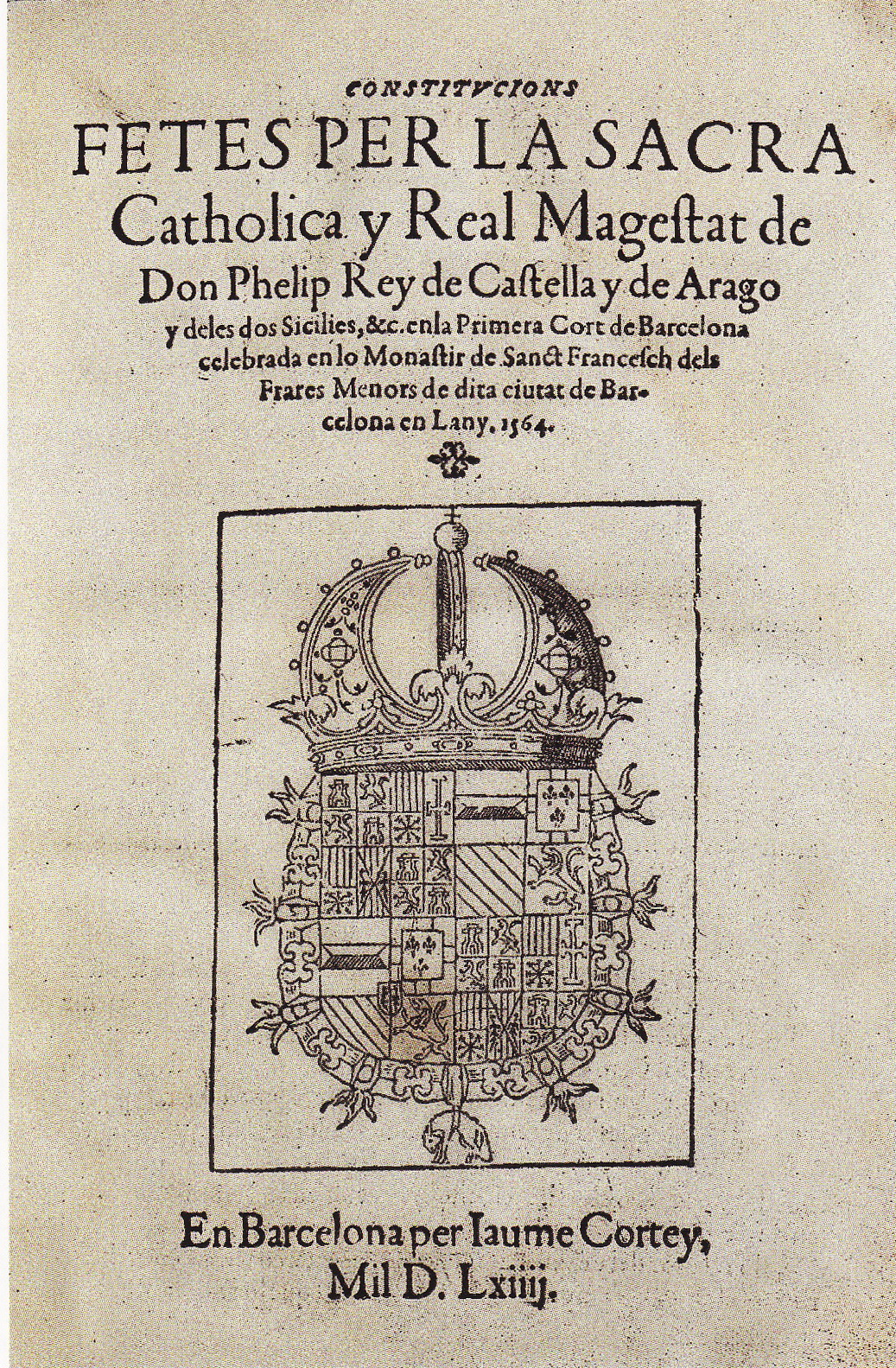 Constitucions, capítols i actes de Cort de les Corts de Barcelona de 1564 presidides per Felip II de Castella.